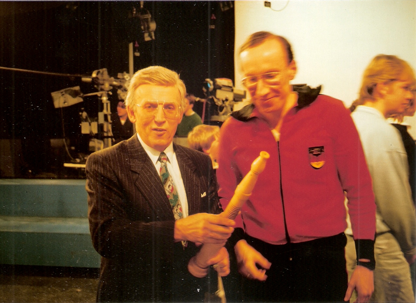 Die Fernsehsendung Sportkalender im Hessischen Rundfunk - 10. Januar 1988: Hans-Joachim Rauschenbach mit Franz-Josef Sehr